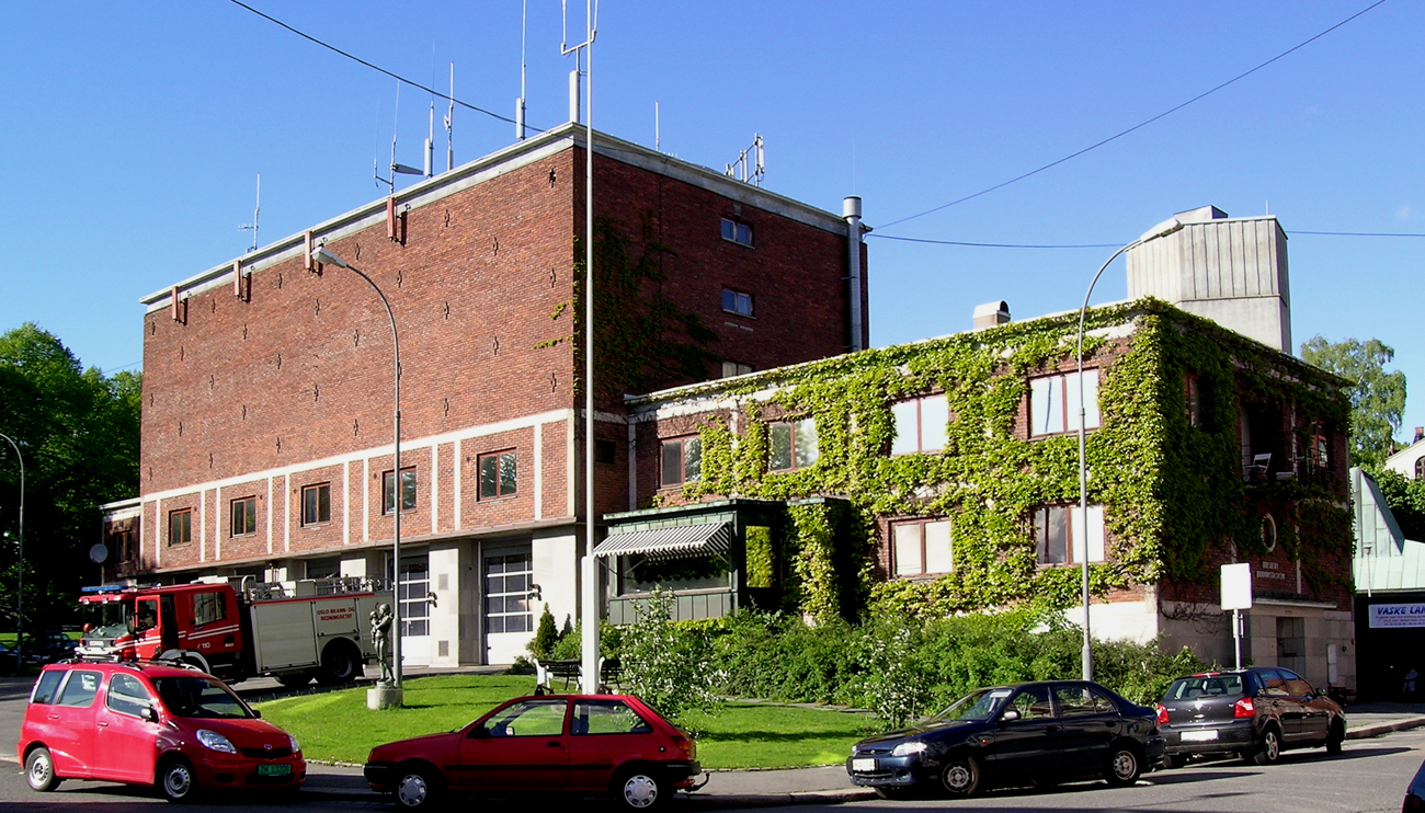 Briskeby brannstasjon, Oslo.